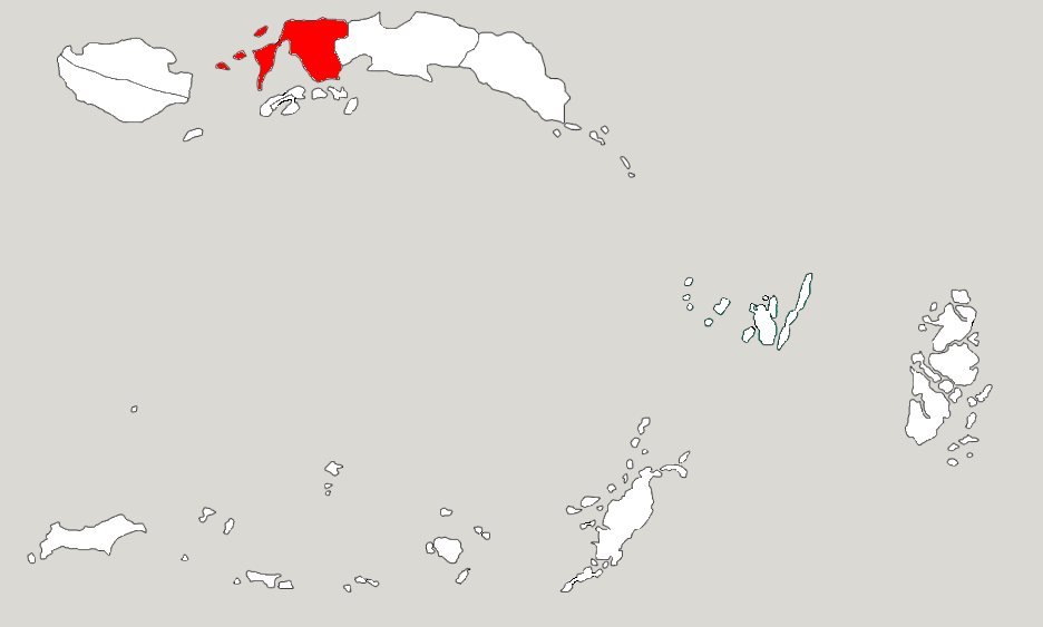 Округ Західний Серам-Багіан